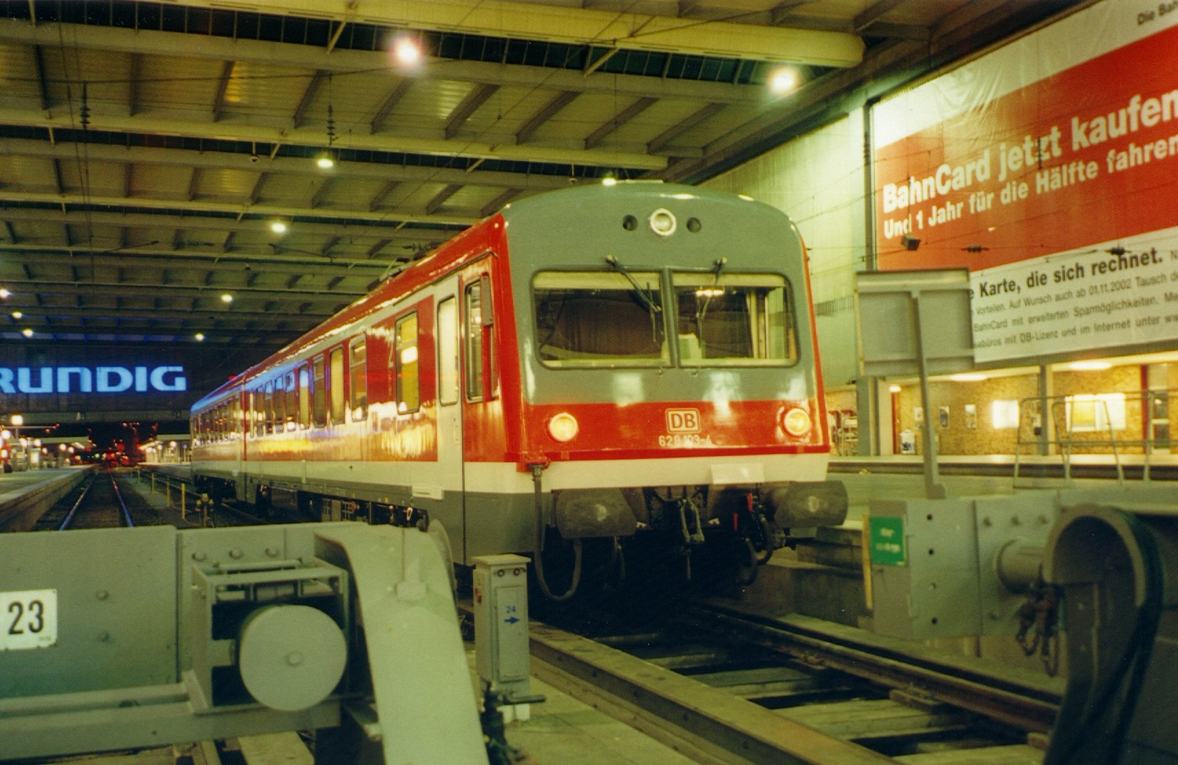 628 103 am 05.07.2002 in München Hbf als RE 21298